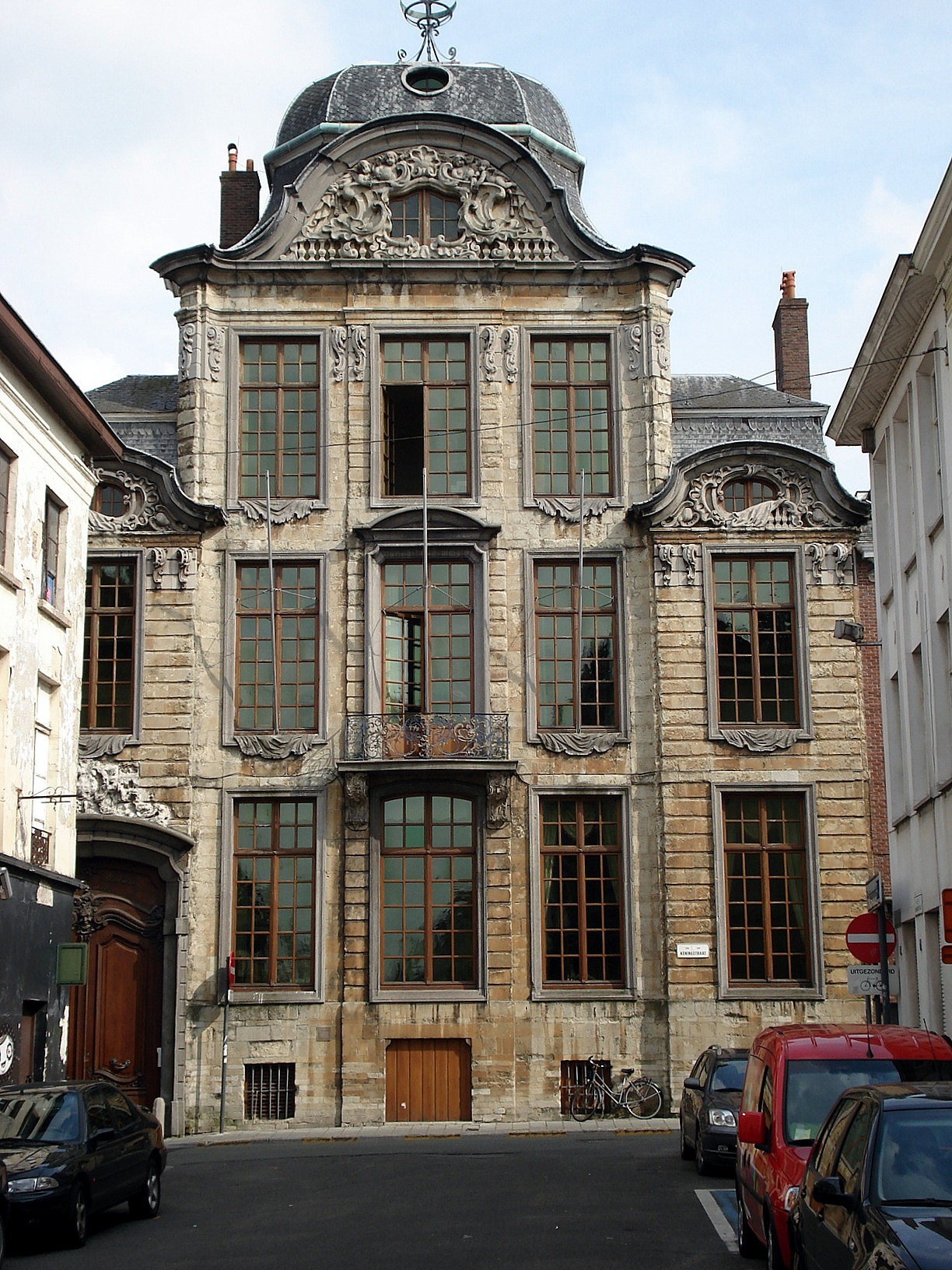 Gent, David 't kindtherenhuis, bouwjaar 1746, rococo, thans Koninklijke Vlaamse Academie. Gand, Belgique, hôtel David 't Kindt, érigé 1746, style rococo Louis XV, actuellement Académie royale flamande.